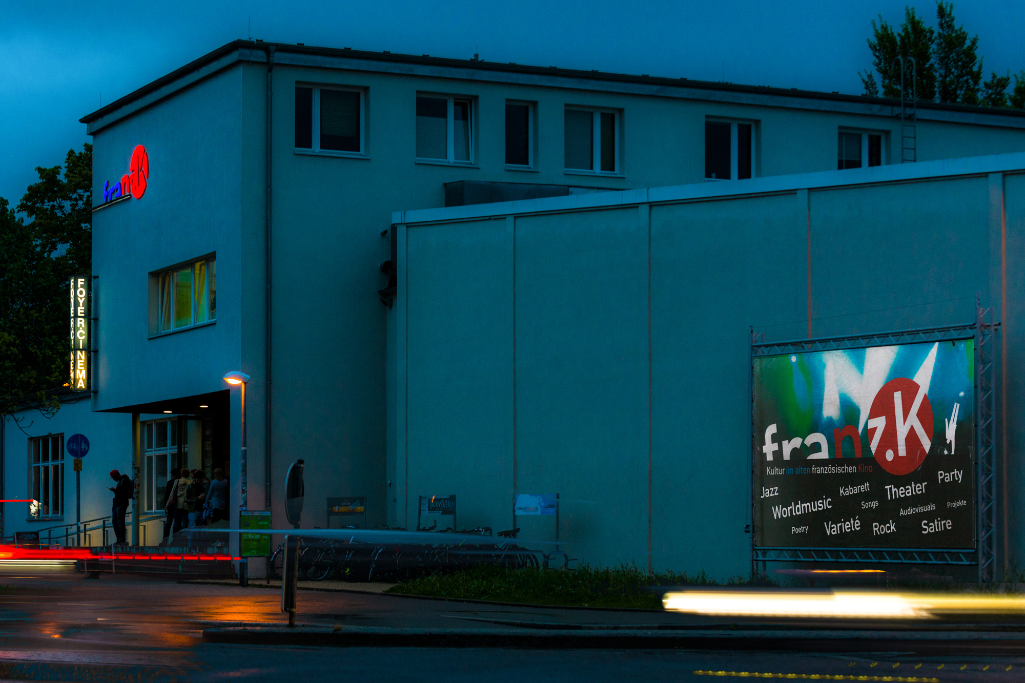 Franzk Fassade Quer